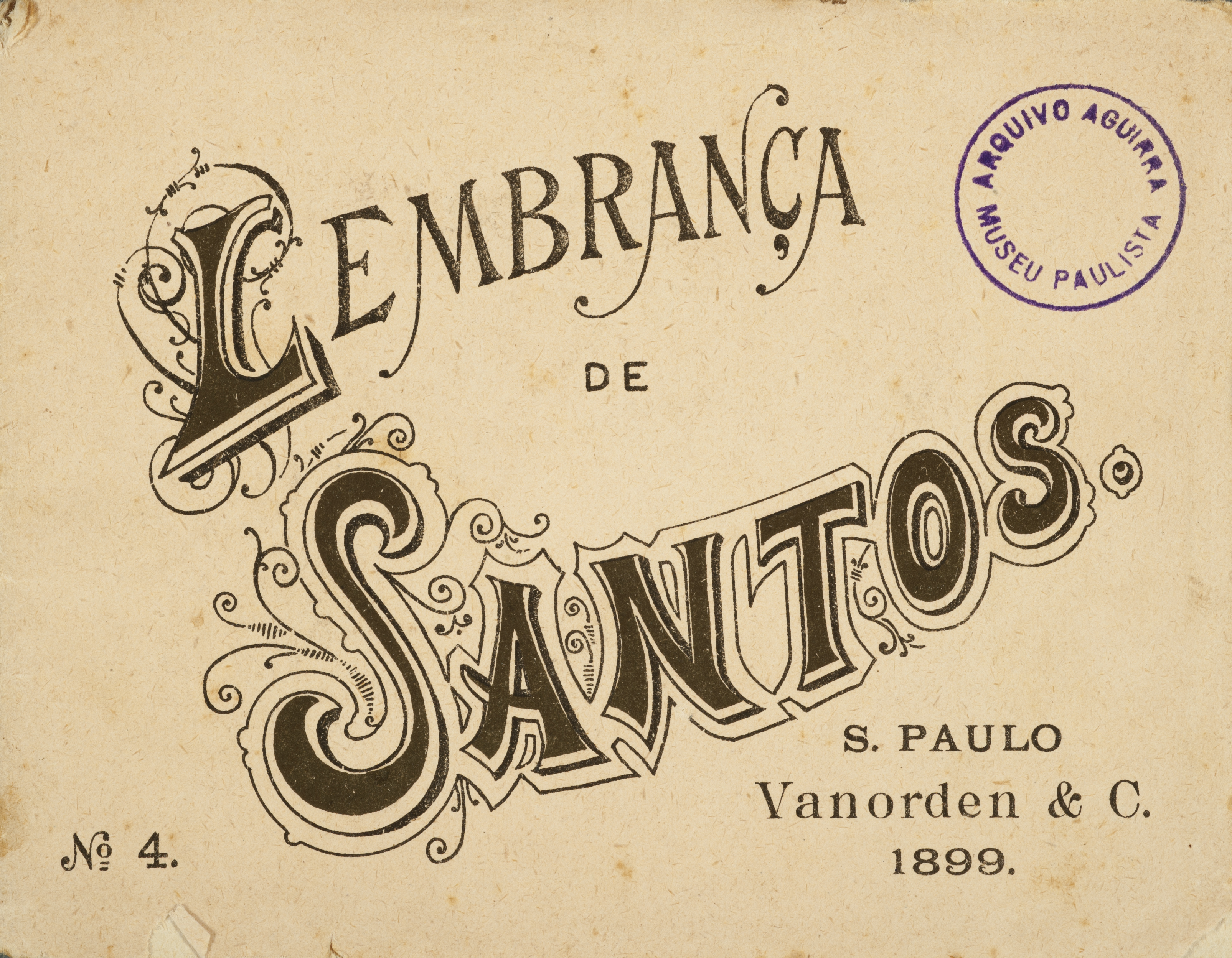 Obra que integra o acervo do Museu Paulista da USP. Coleção João Baptista de Campos Aguirra.